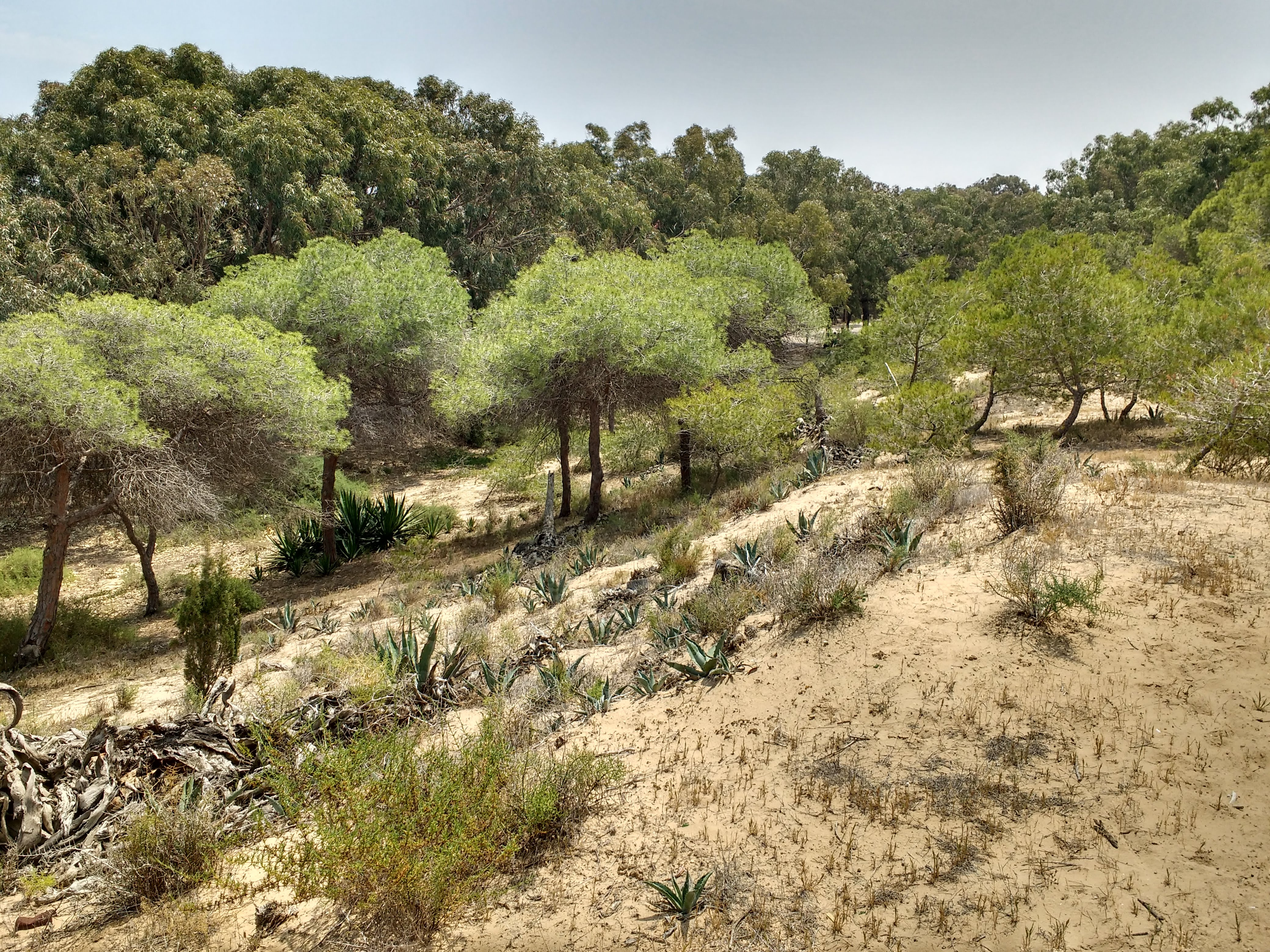 Dunes de Guardamar This is a photography of a Site of Community Importance in Spain with the ID: ES5213025. Natura2000 entry, EEA entry